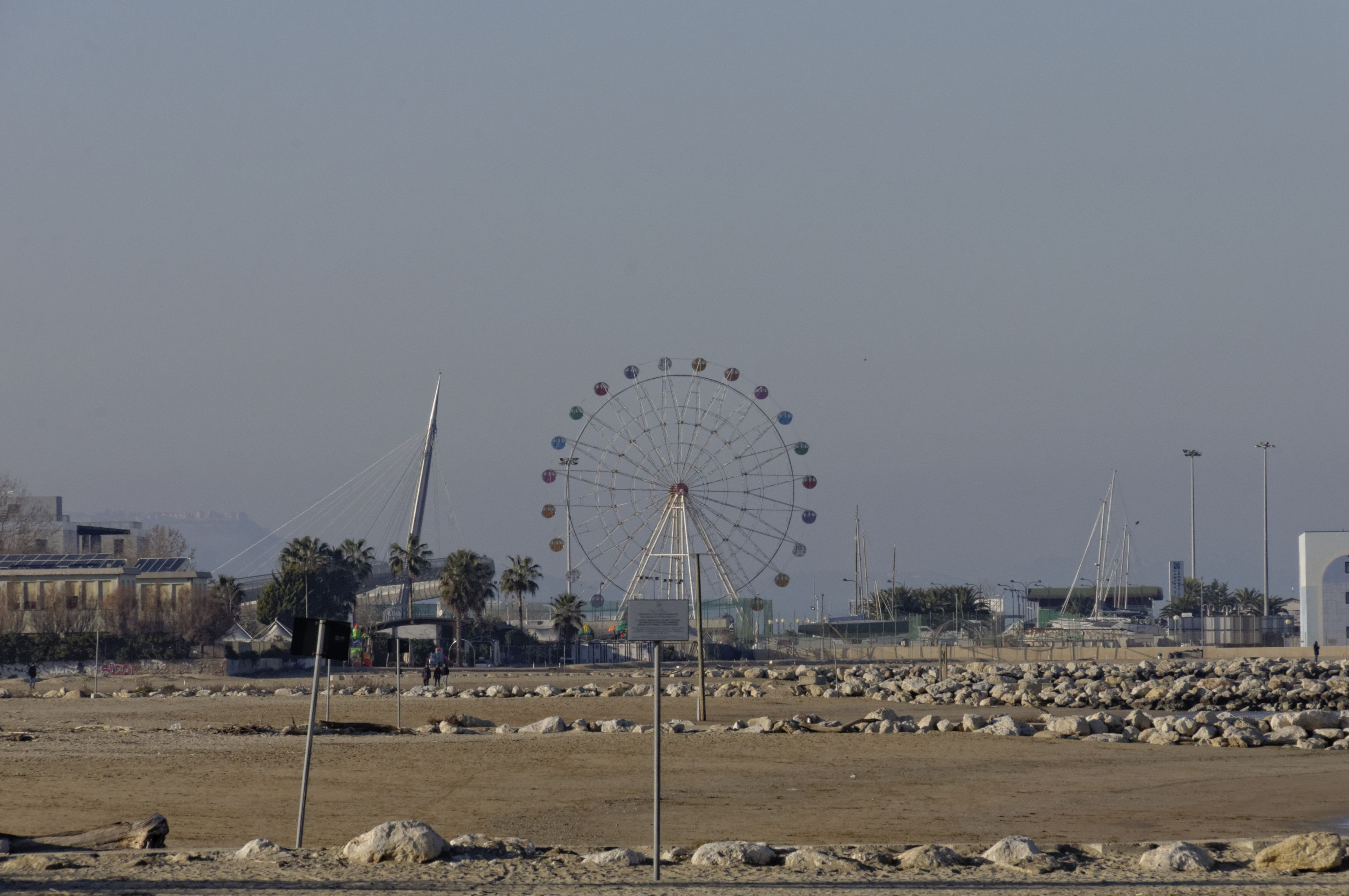 Pescara 2018